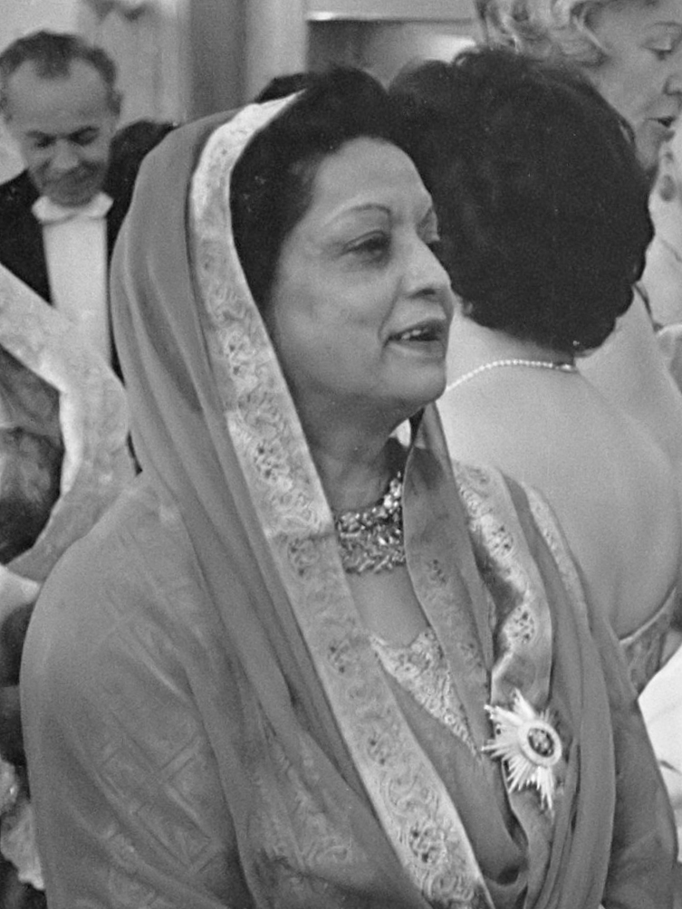 Afscheidsdiner van Begum Ra'ana Liaquat Ali Khan, ambassadrice van Pakistan in Nederland. Hier met mevrouw Nishimura, mevrouw Valdez en Roxas 6 juni 1961